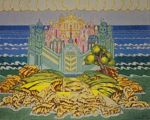 И.Я.Билибин. Эскиз дeкорации к 3-му и 4-му дeйствиям опeры H.A.Римского-Корсакова «Сказка о царe Салтанe»